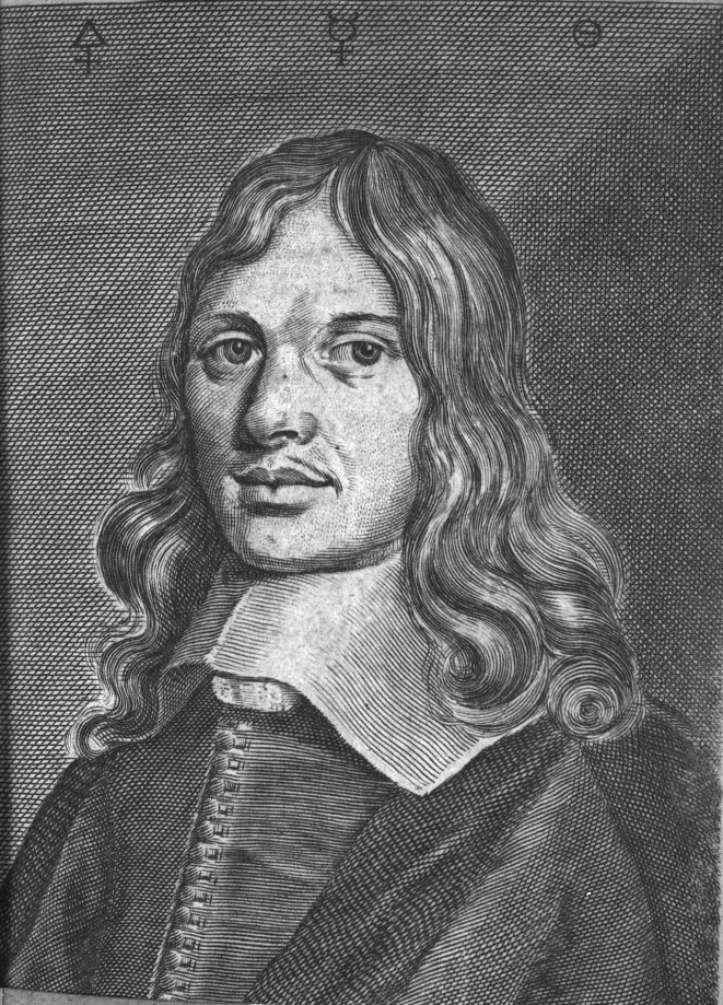 Portrait J. F. Helvetius